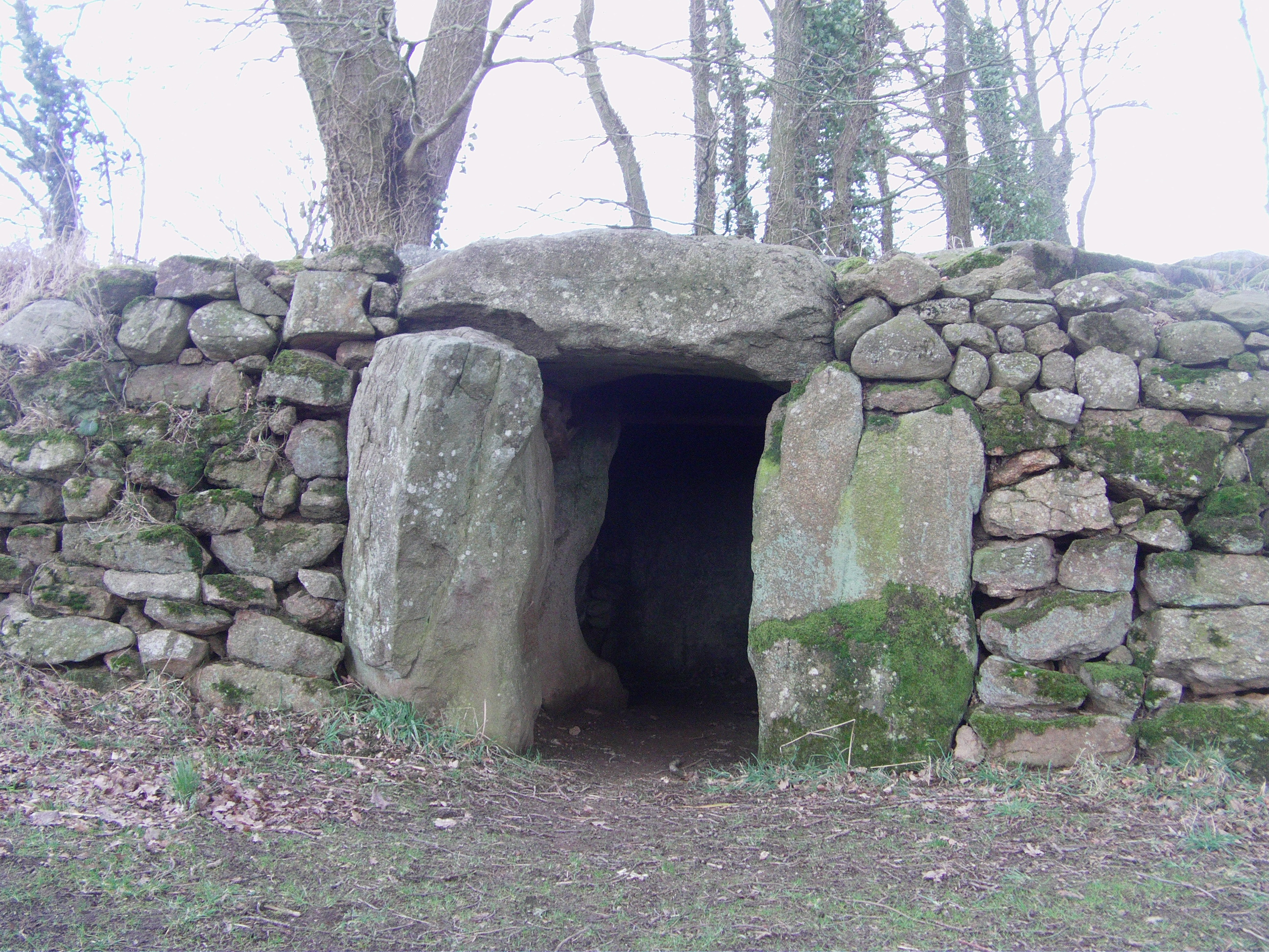 Brécé (Mayenne) , dolmen du Petit Vieux Sou